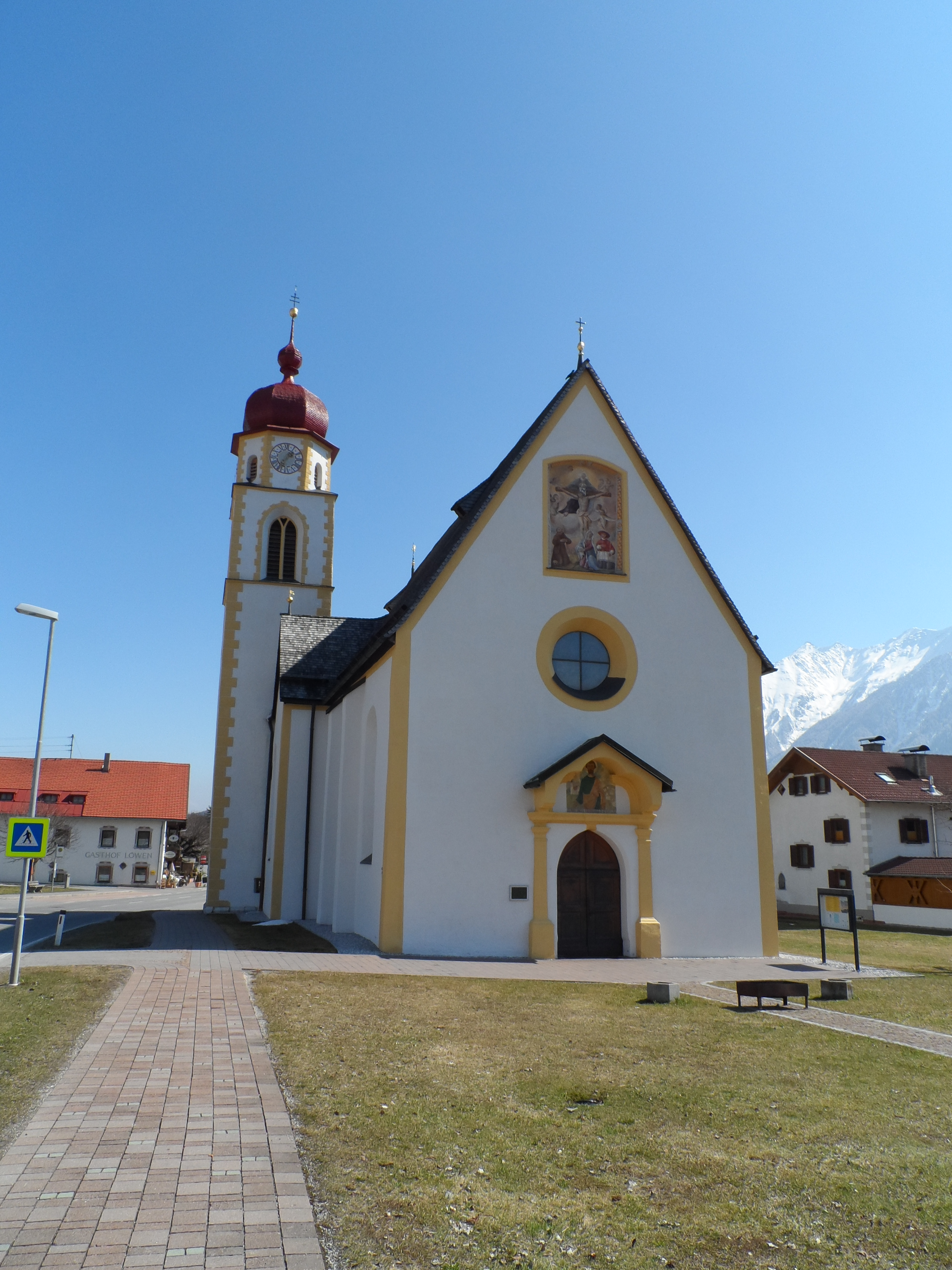 Kath. Pfarrkirche Hl. Dreifaltigkeit in Barwies - Barwies, Mieming